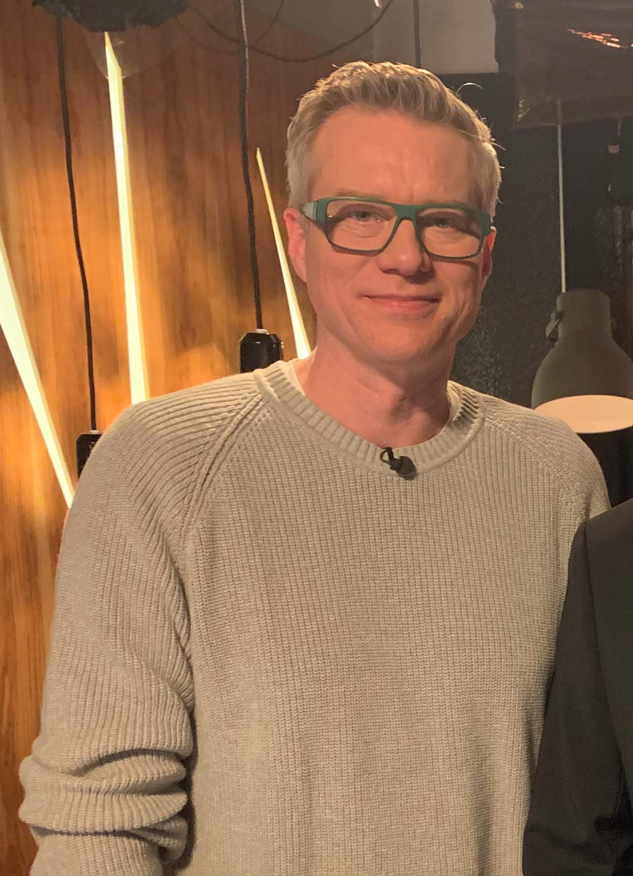 Mårten Svartström under inspelning av programmet för 15.4.2019